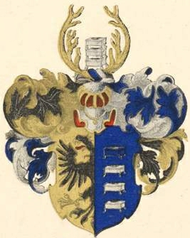 Schultzeni suguvõsa aadlivapp